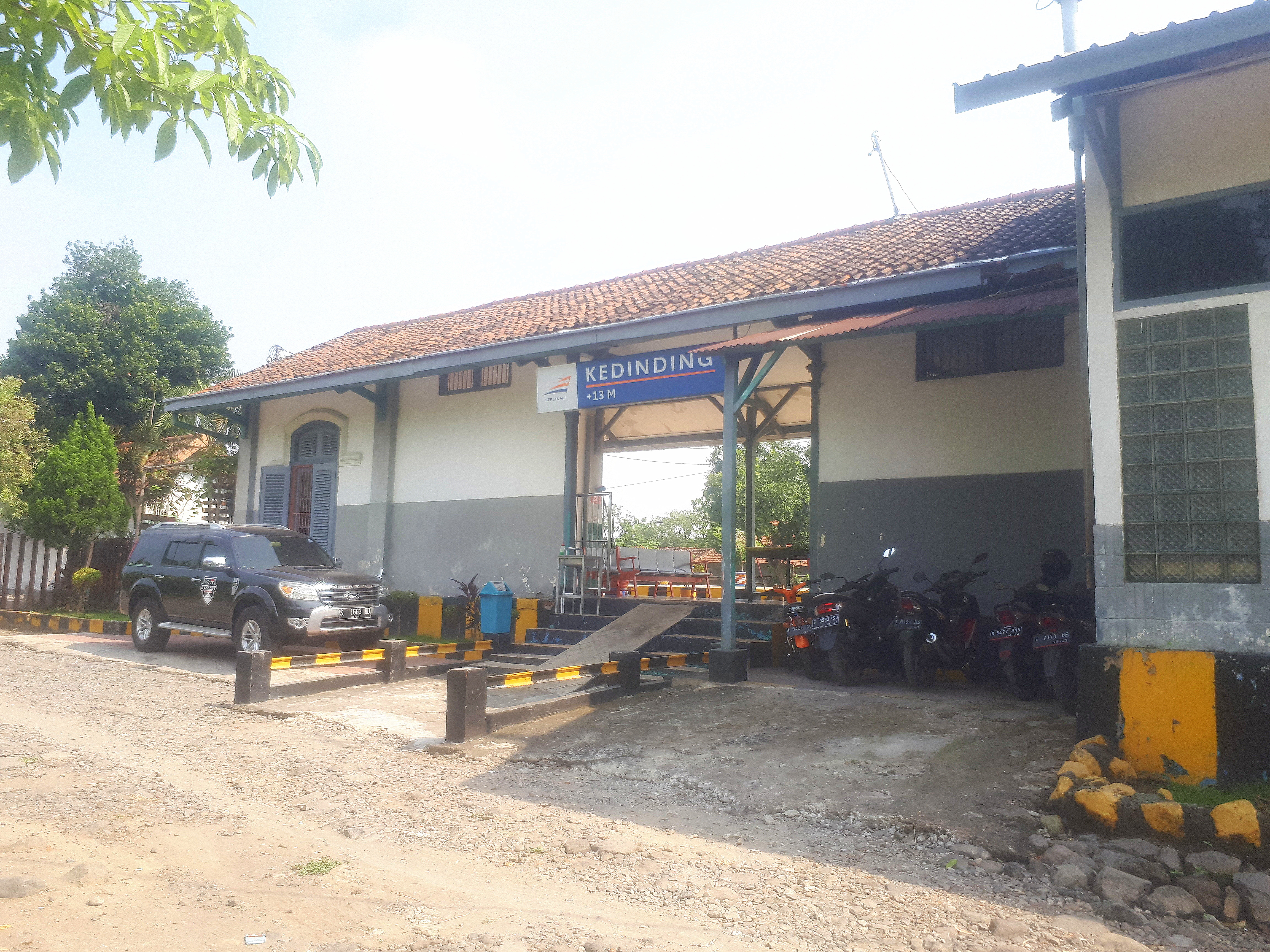 Tampak depan Stasiun Kedinding, 2020